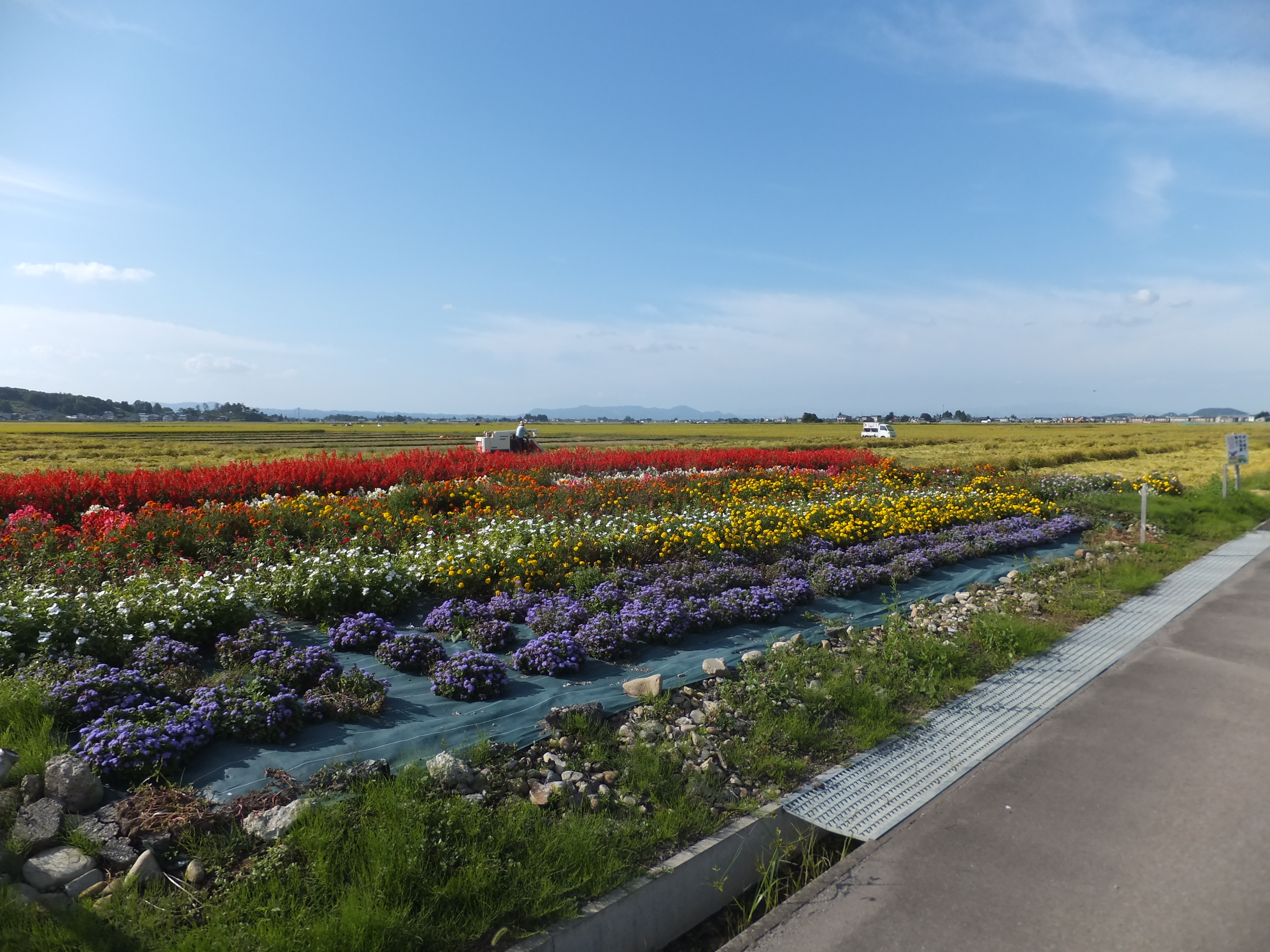 横手盆地、田園の中の花壇